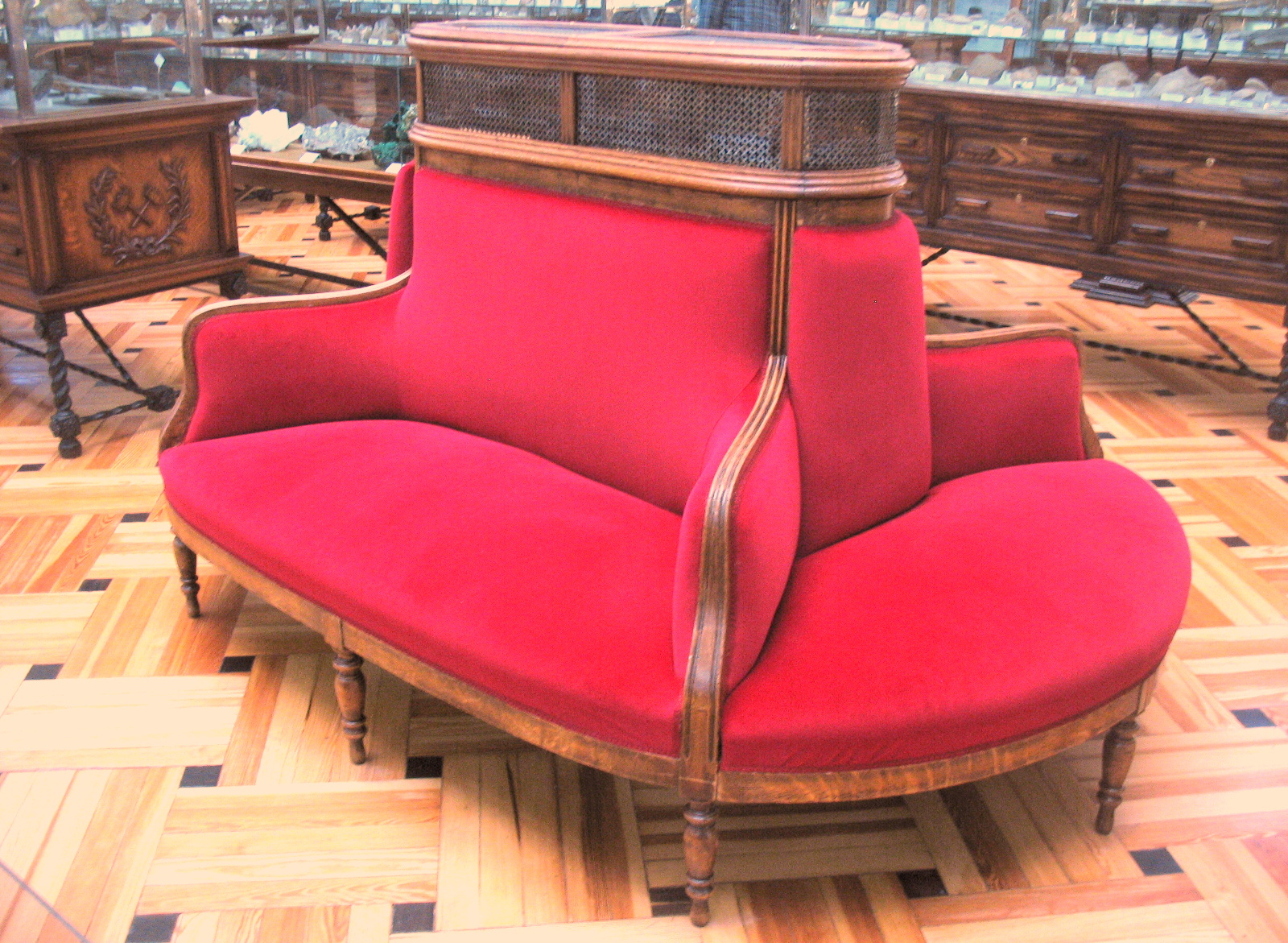 Sofá cubrerradiadores. Museo Geominero, Madrid, España